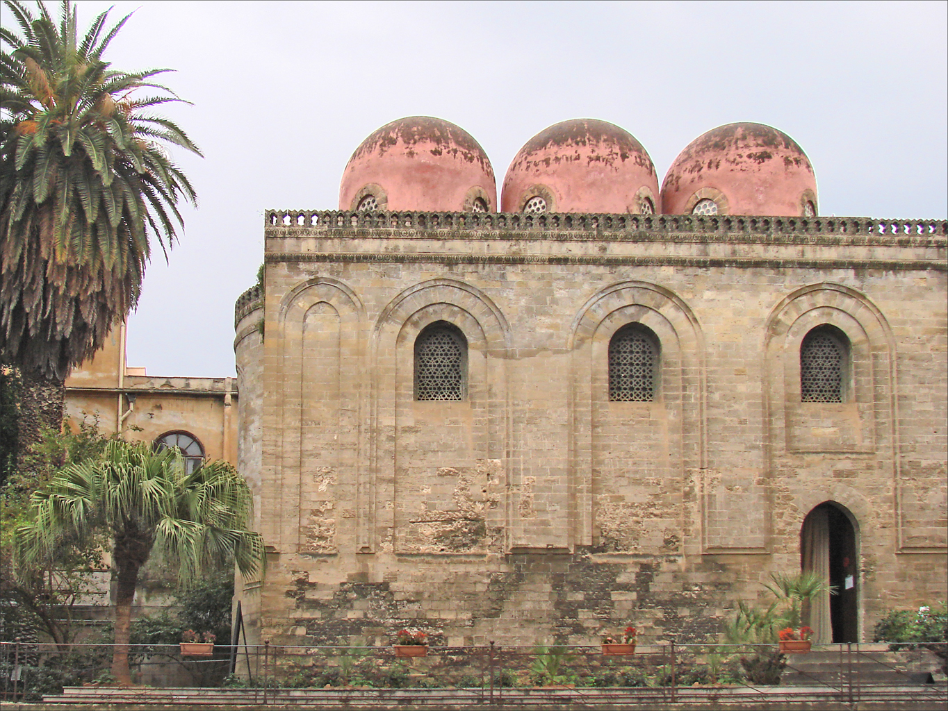 San Cataldo a été fondée à l'époque normande (vers 1160) et a été le siège de l'ordre des Chevaliers du Saint Sépulcre. Elle est dans un style arabe caractérisé par sa forme carrée, ses merlons dentelés, ses arcatures et ses coupoles rosées. L'intérieur est structuré en 3 nefs séparées par des colonnes antiques de réemploi. Le pavement en mosaïque de marbre polychrome date de la construction. Article de Wikipedia